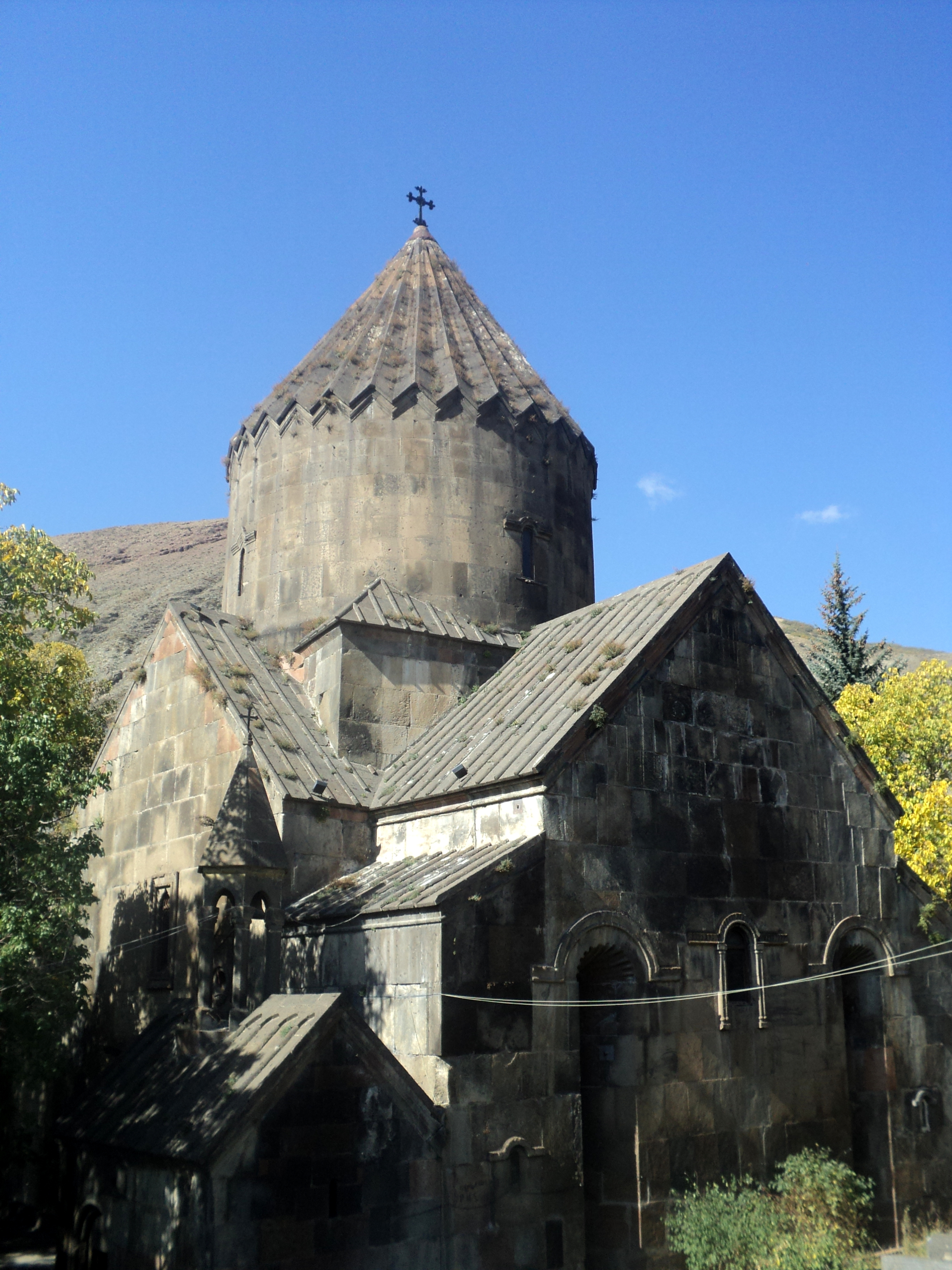 Եկեղեցի Սբ. Աստվածածին, Բջնի 19/49.1